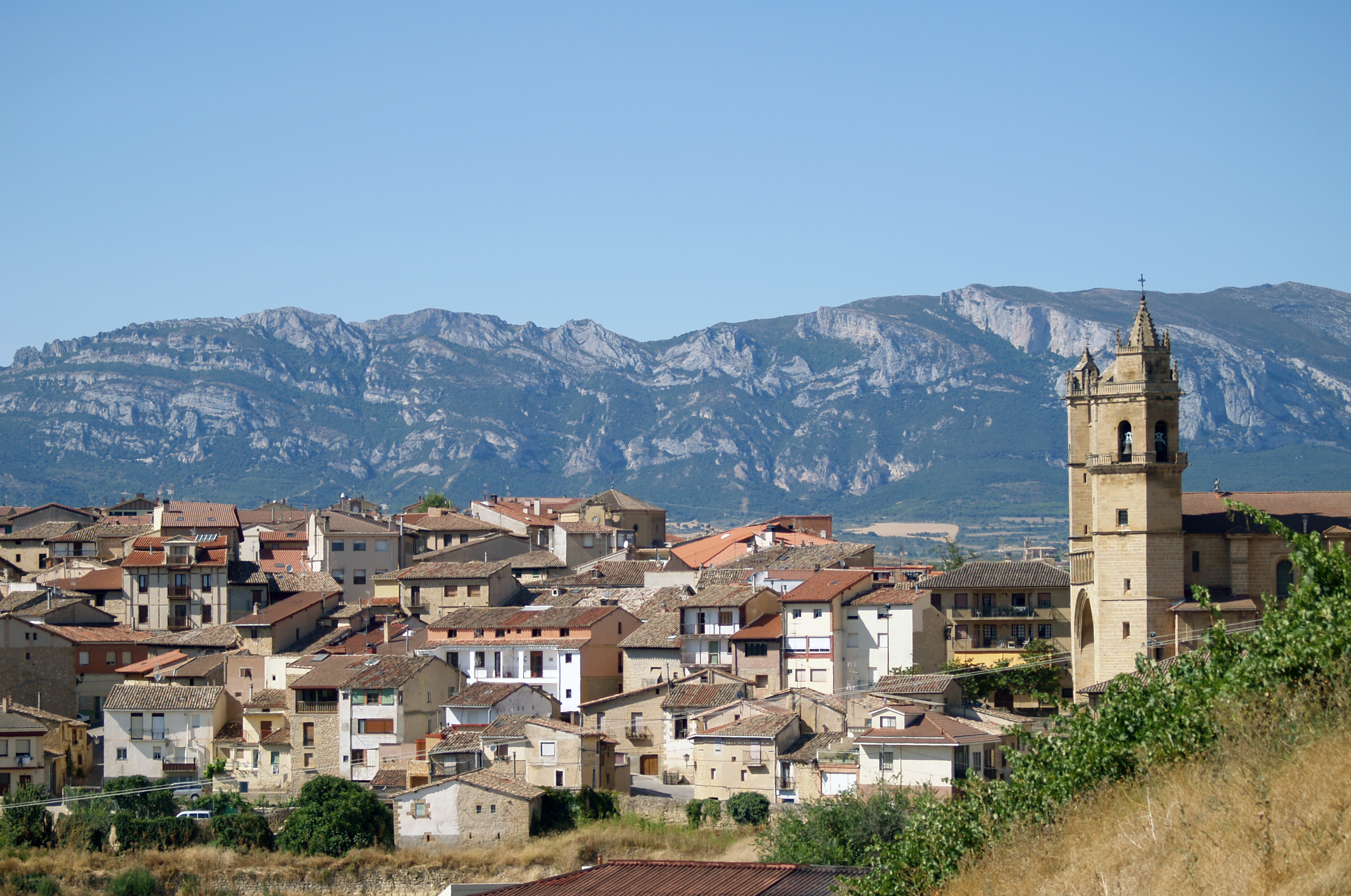 Eltziegoko (Araba) bista.